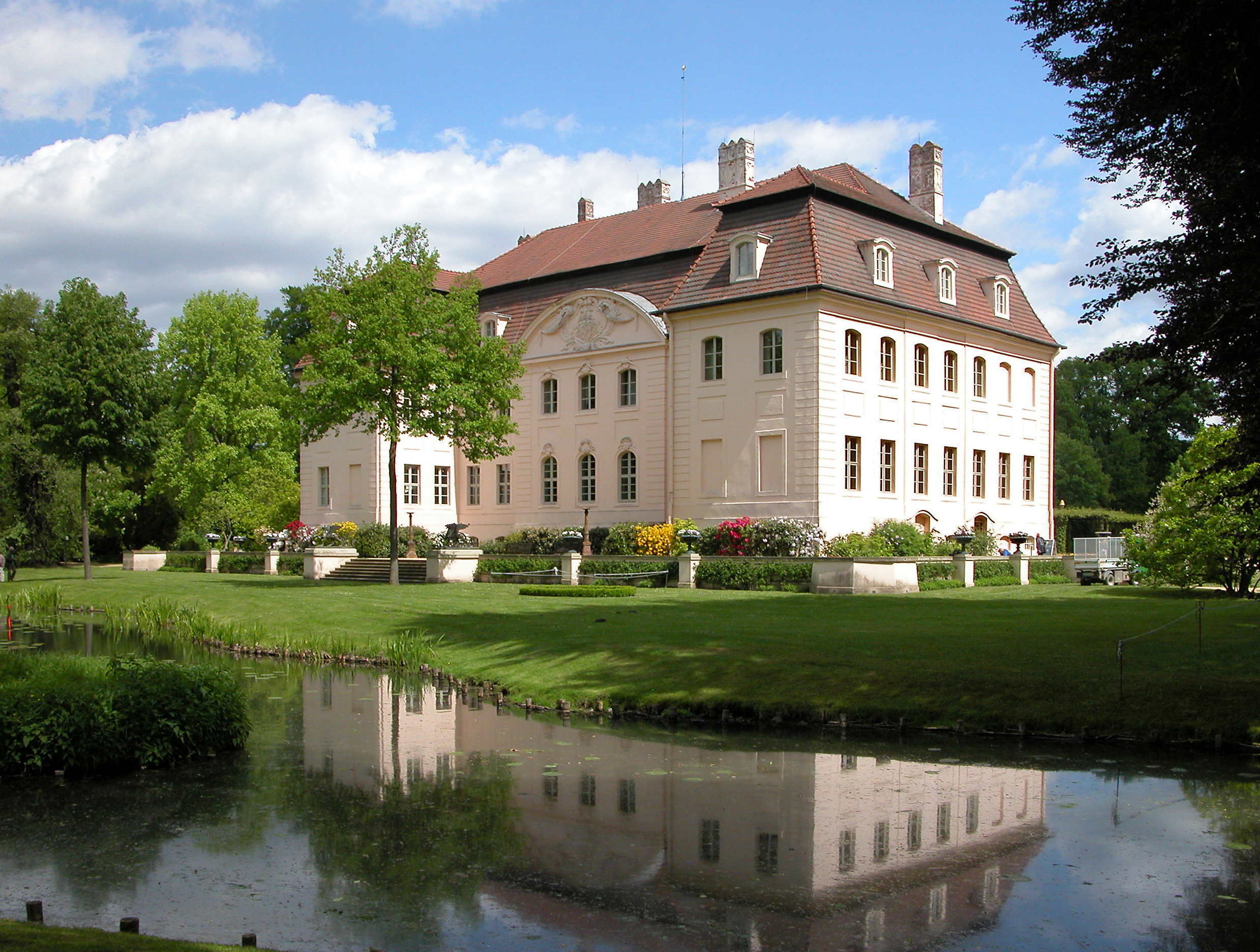 13.05.2015 03042 Branitz (zu Cottbus): Fürst-Pückler-Park Branitz. Schoß von SüdwestenDie Herrschaft Branitz gelangte 1696 in den Besitz der Grafenfamilie Pückler. 1846 bis 1871 legte Hermann Fürst Pückler-Muskau den Landschaftspark an. Das Schloß Branitz wurde 1772 nach Entwurf von Gottfried Semper errichtet. 1850 erfolgte ein Umbau. 1945 enteignet. In der DDR Bezirksmuseum. Die museale Nutzung blieb bis heute erhalten. Seit 1995 wird der Innenpark mit Pleasureground u nd Schloß von der kommunalen Stiftung Fürst-Pückler-Museum Park und Schloß Branitz verwaltet und gepflegt. [DSCN5631.JPG]20150513360DR.JPG(c)Blobelt